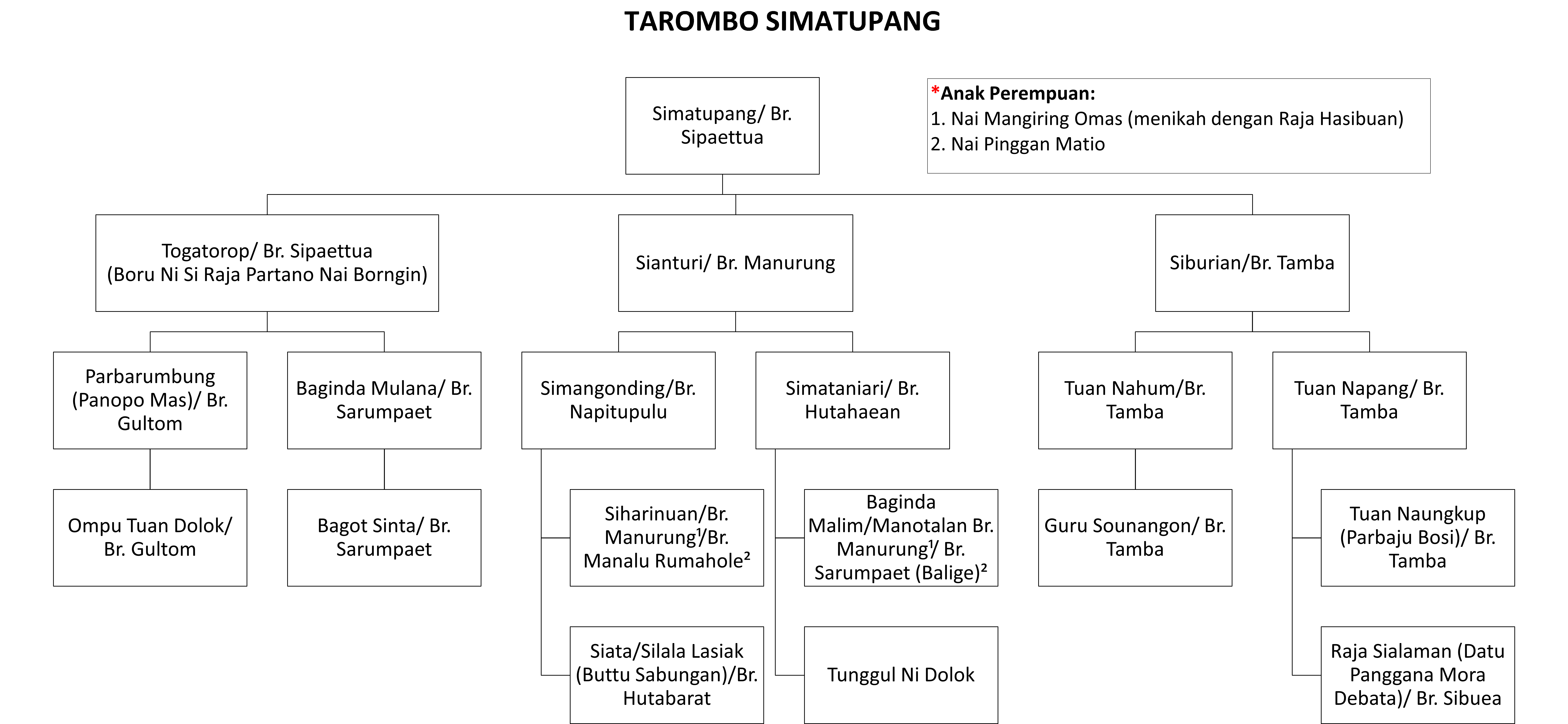 Tarombo Marga Simatupang (Togatorop, Sianturi, Siburian)